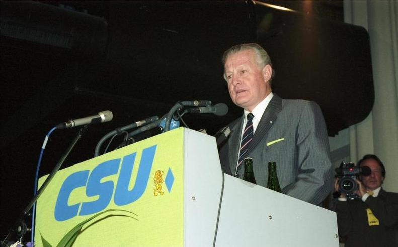 53. CSU-Parteitag in der Münchner Bayernhalle mit dem CSU-Vorsitzenden, Bundesminister für Finanzen Dr. Theodor Waigel, dem bayerischen Ministerpräsidenten Max Streibel, Bundesminister Hans Klein, und als Gast Bundeskanzler Helmut Kohl. 17.-18.11.1989